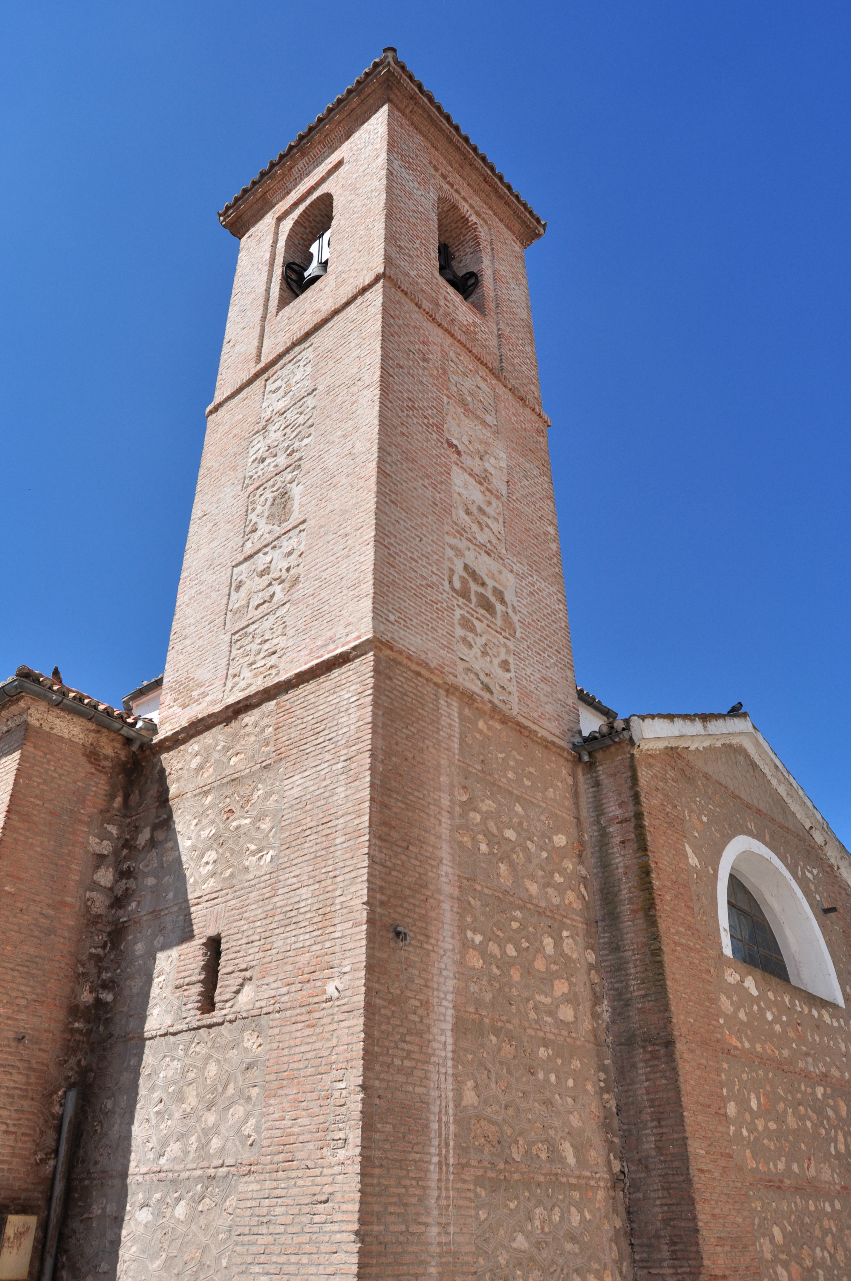 Orusco de Tajuña - 001